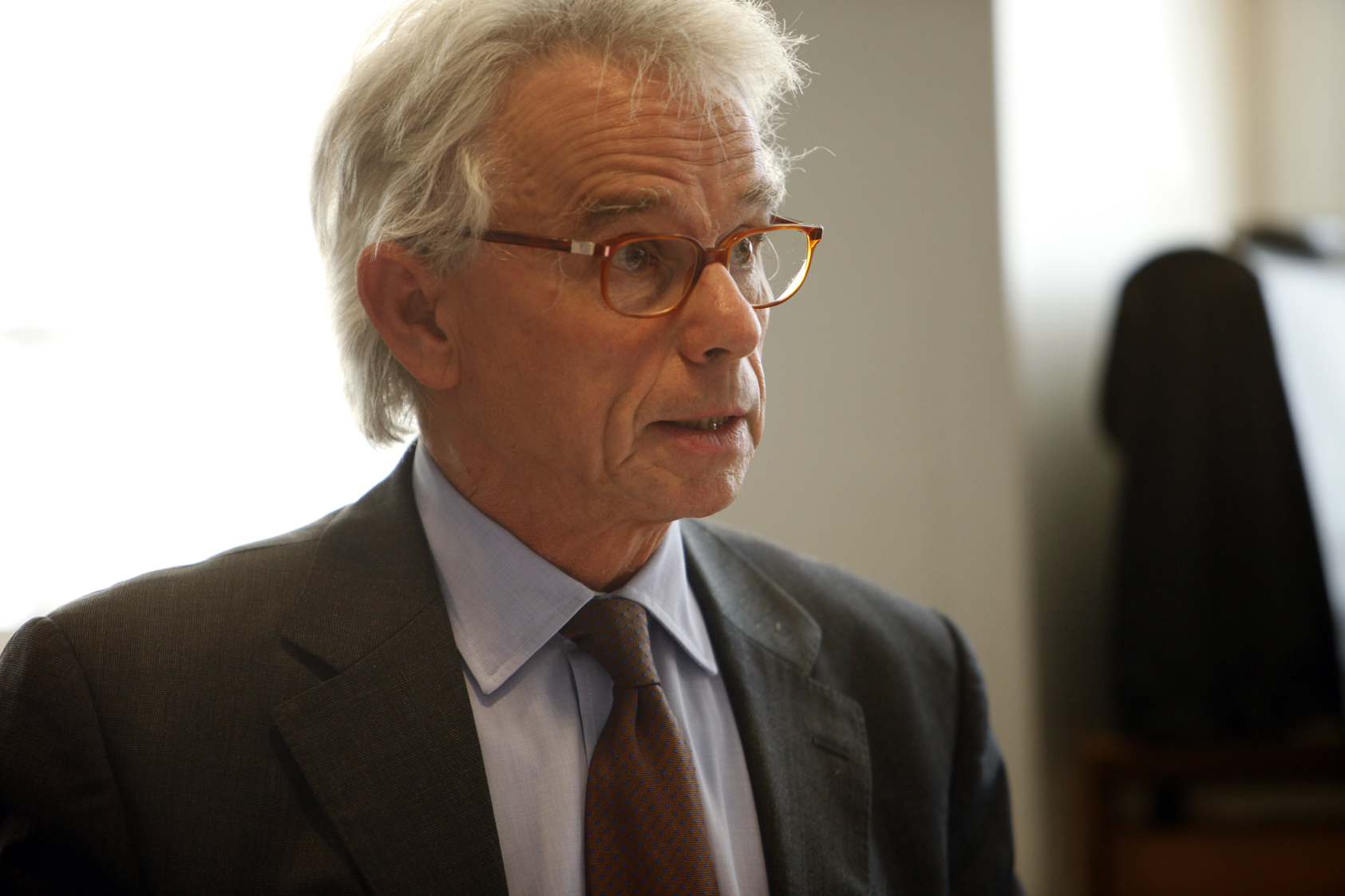 Conseil de surveillance (octobre 2009)